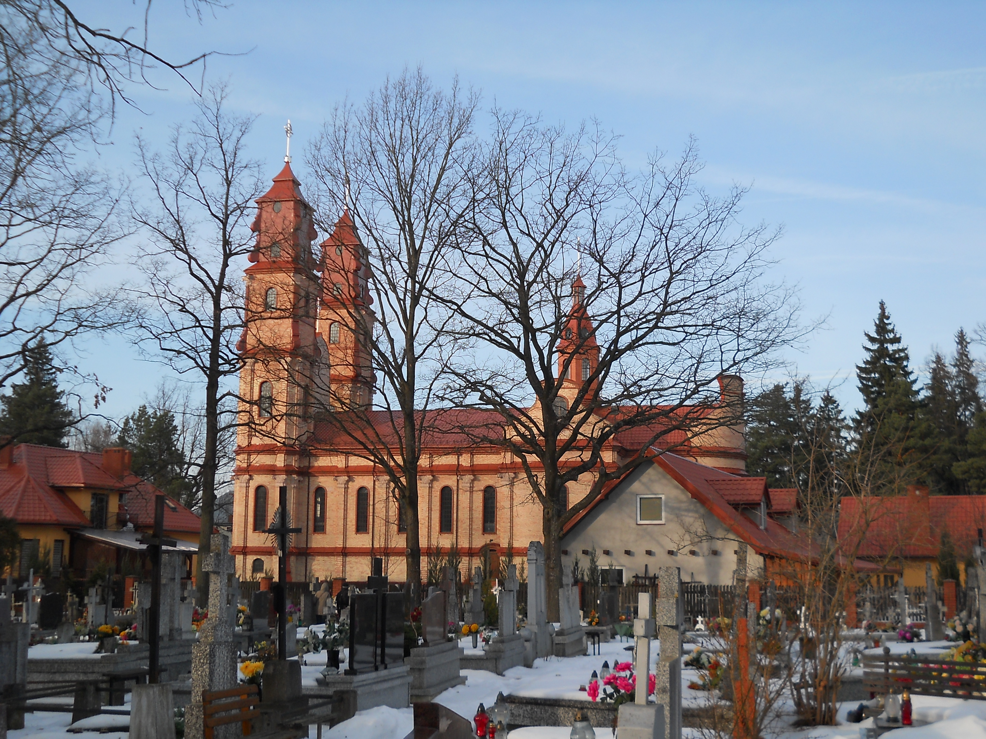 Kościół Św. Cyryla i Metodego w Hajnówce (od strony cmentarza katolickiego).